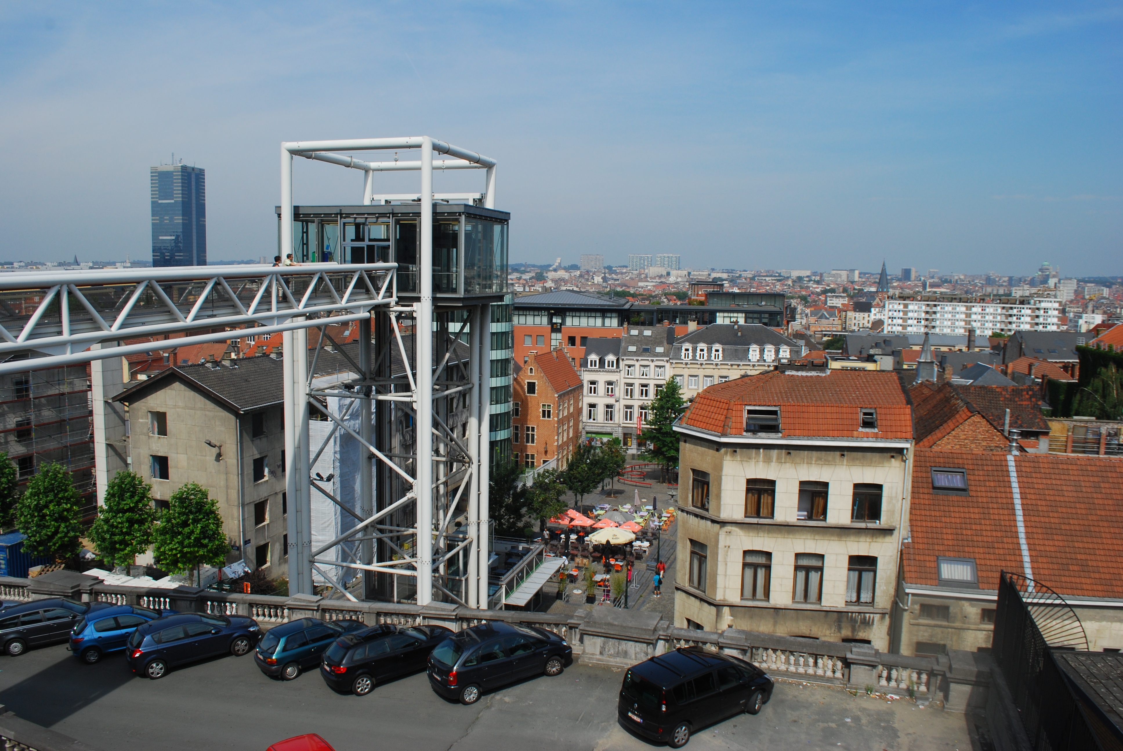 Vue sur les Marolles et le bas de la ville, depuis la place Poelaert à Bruxelles.